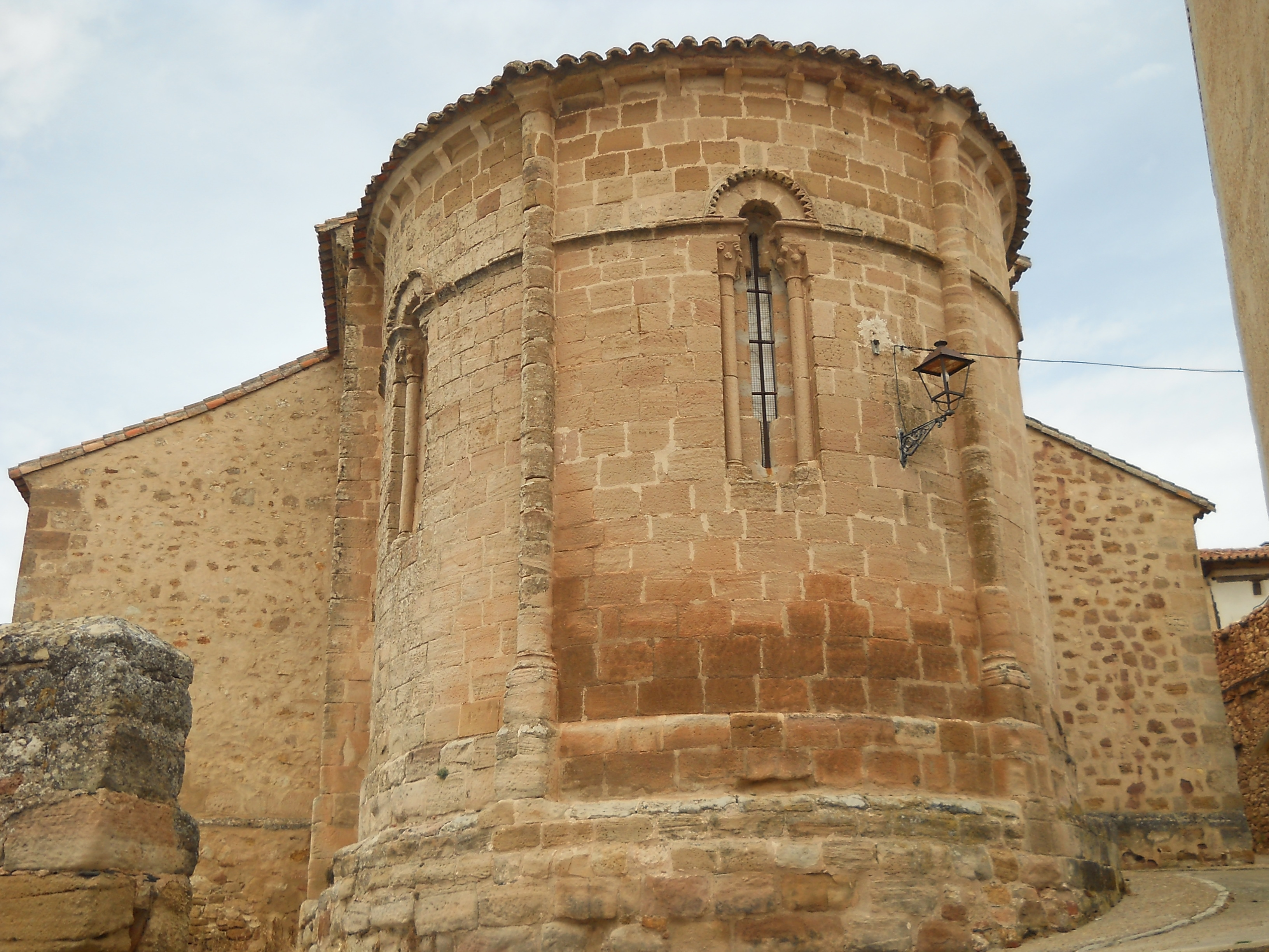 Ábside, iglesia de San Gil, Atienza, Guadalajara, España